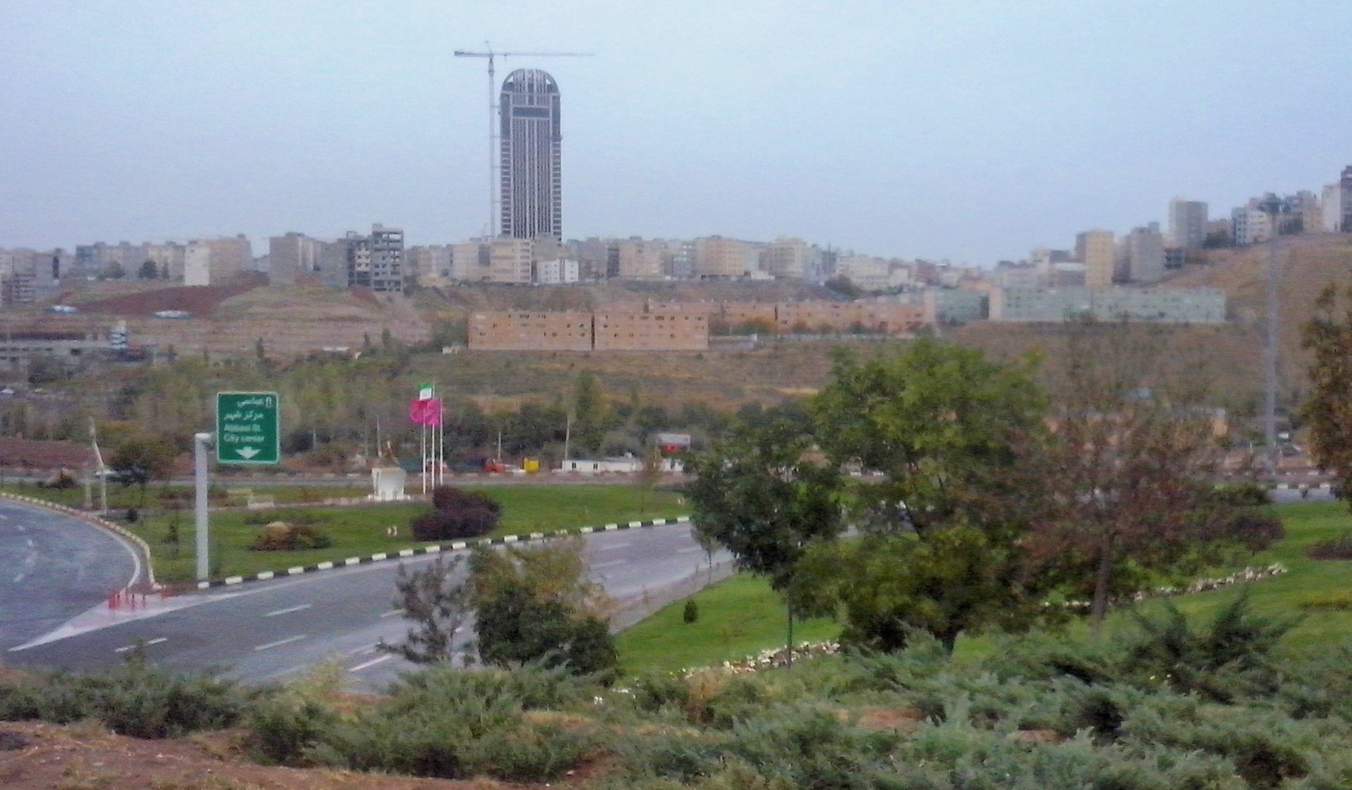 برج مرکز تجارت جهانی تبریز.